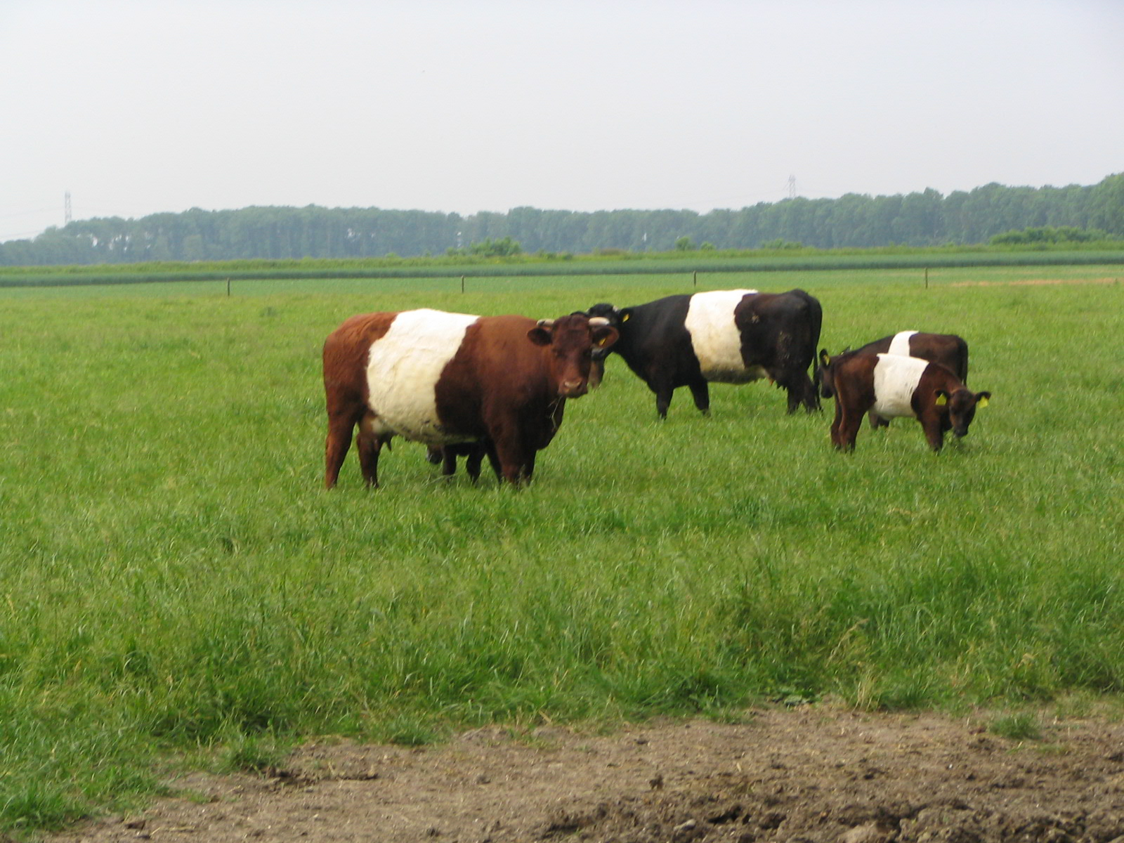 Lakenvelder koeien bij Schokland, NL